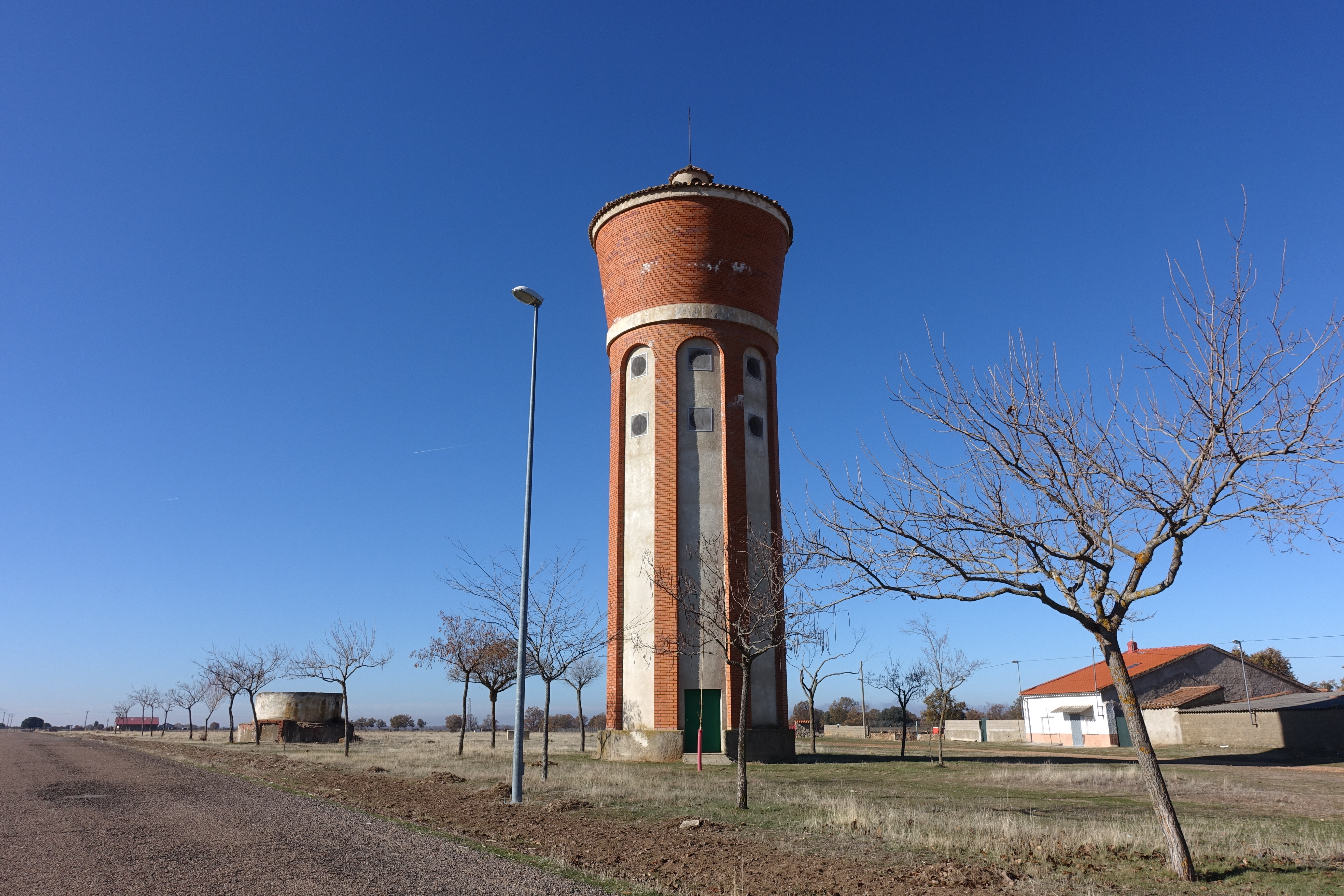 Depósito de agua en Dios le Guarde (Salamanca, España).